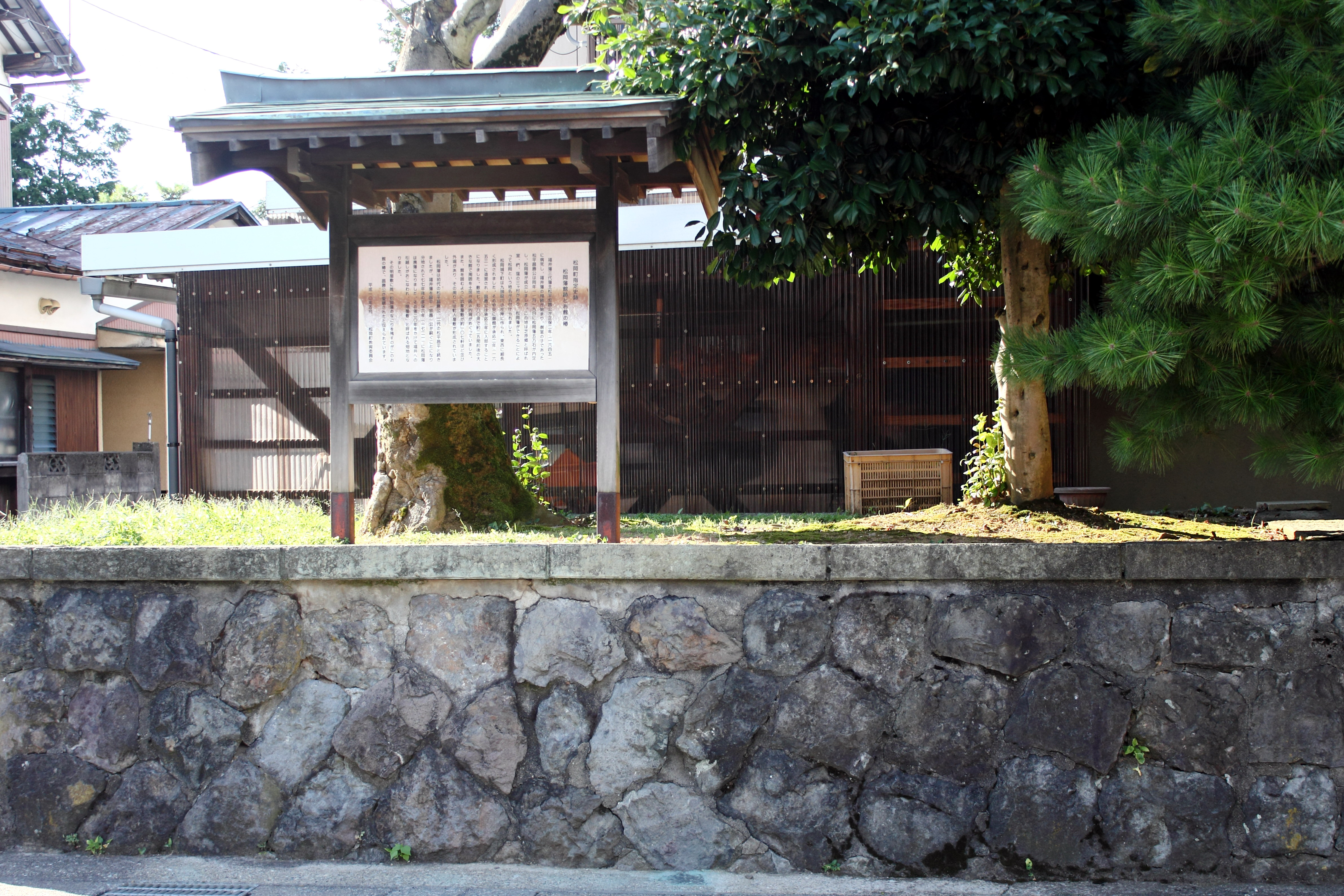 松岡藩陣屋跡